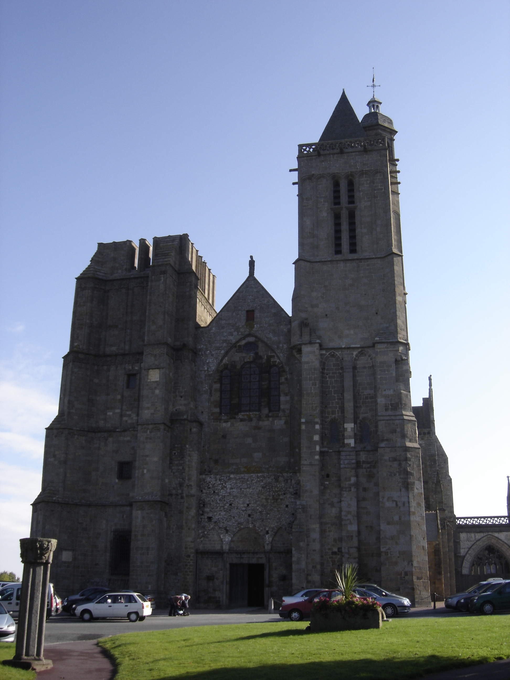 cathédrale de Dol de Bretagne - Façade occidentale